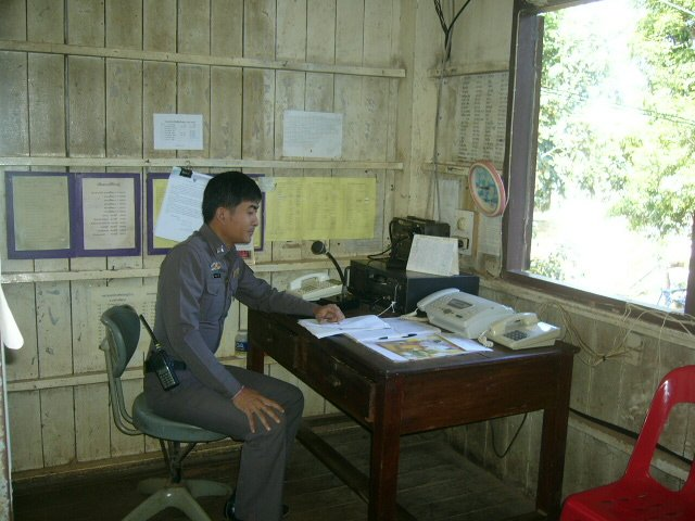 Funksprecher der Polizei Na Wa, Provinz Nakhon Phanom, Thailand